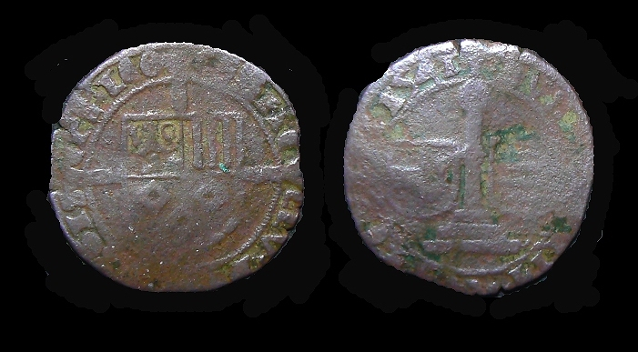 Monnaie liégeoise de Corneille de Berghes, prince-évêque de 1538 à 1544. Le perron est visible au revers.